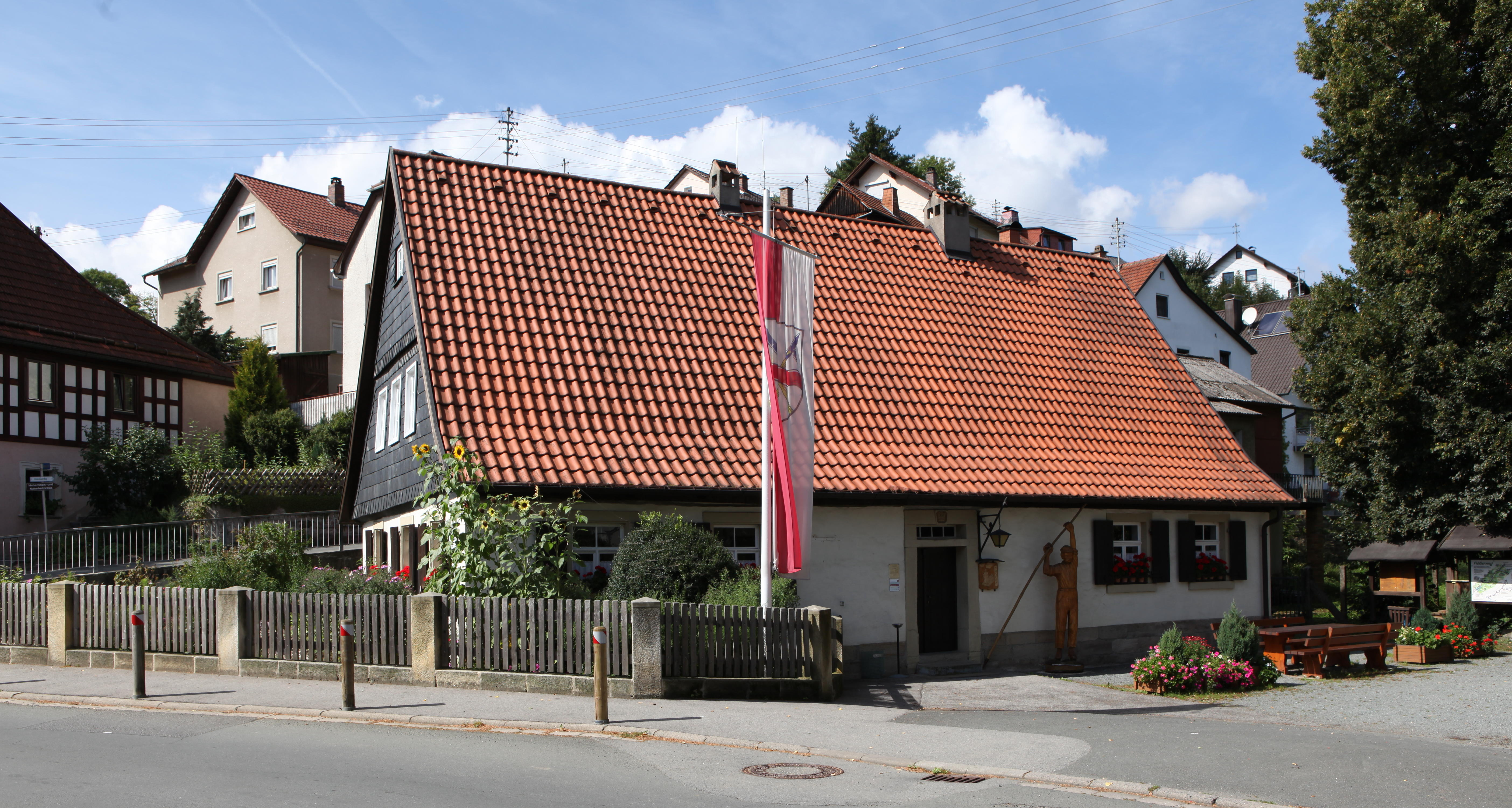 Flößermuseum in Marktrodach, OT Unterrodach, Landkreis Kronach